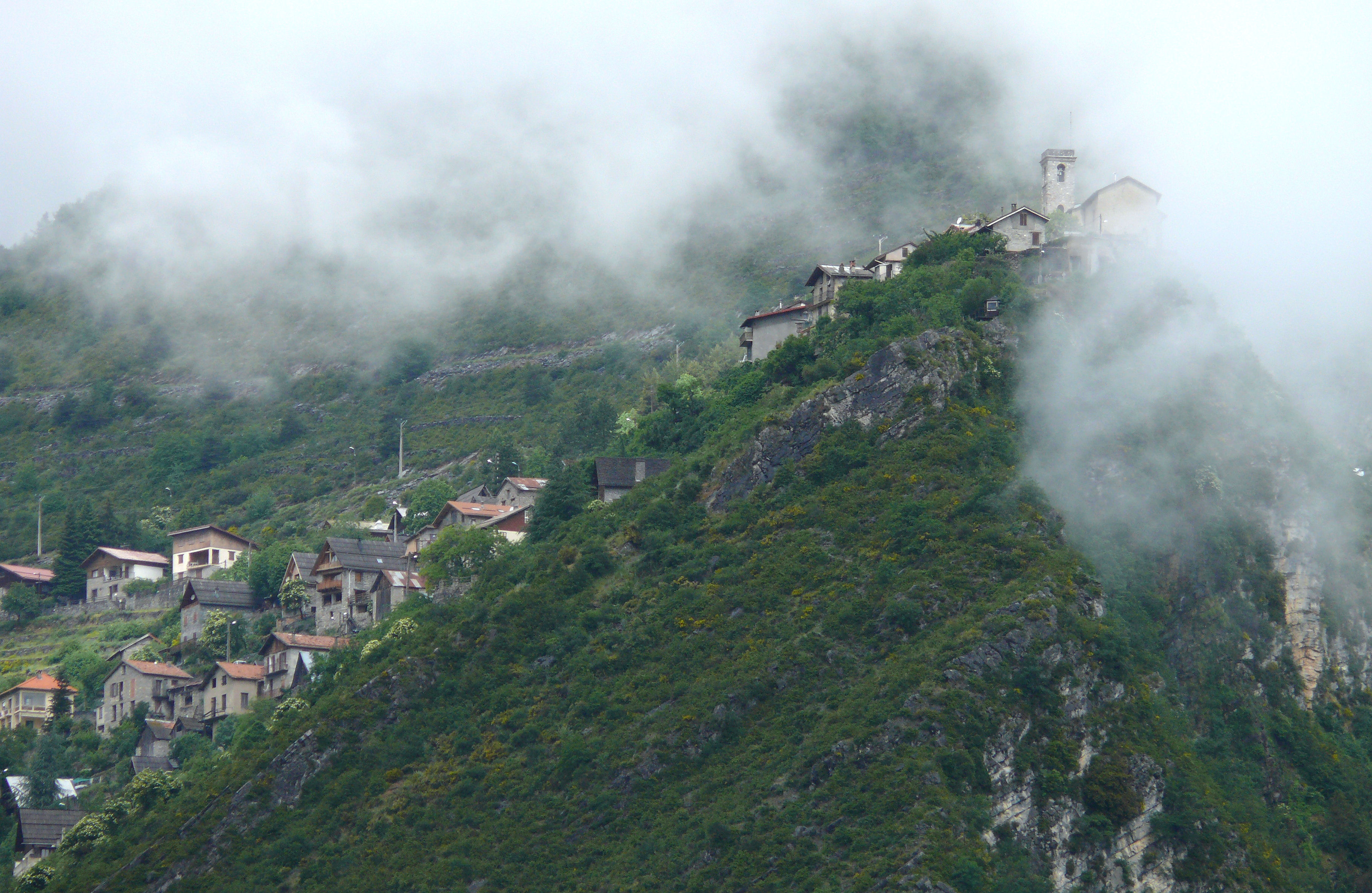 Venanson, village perché